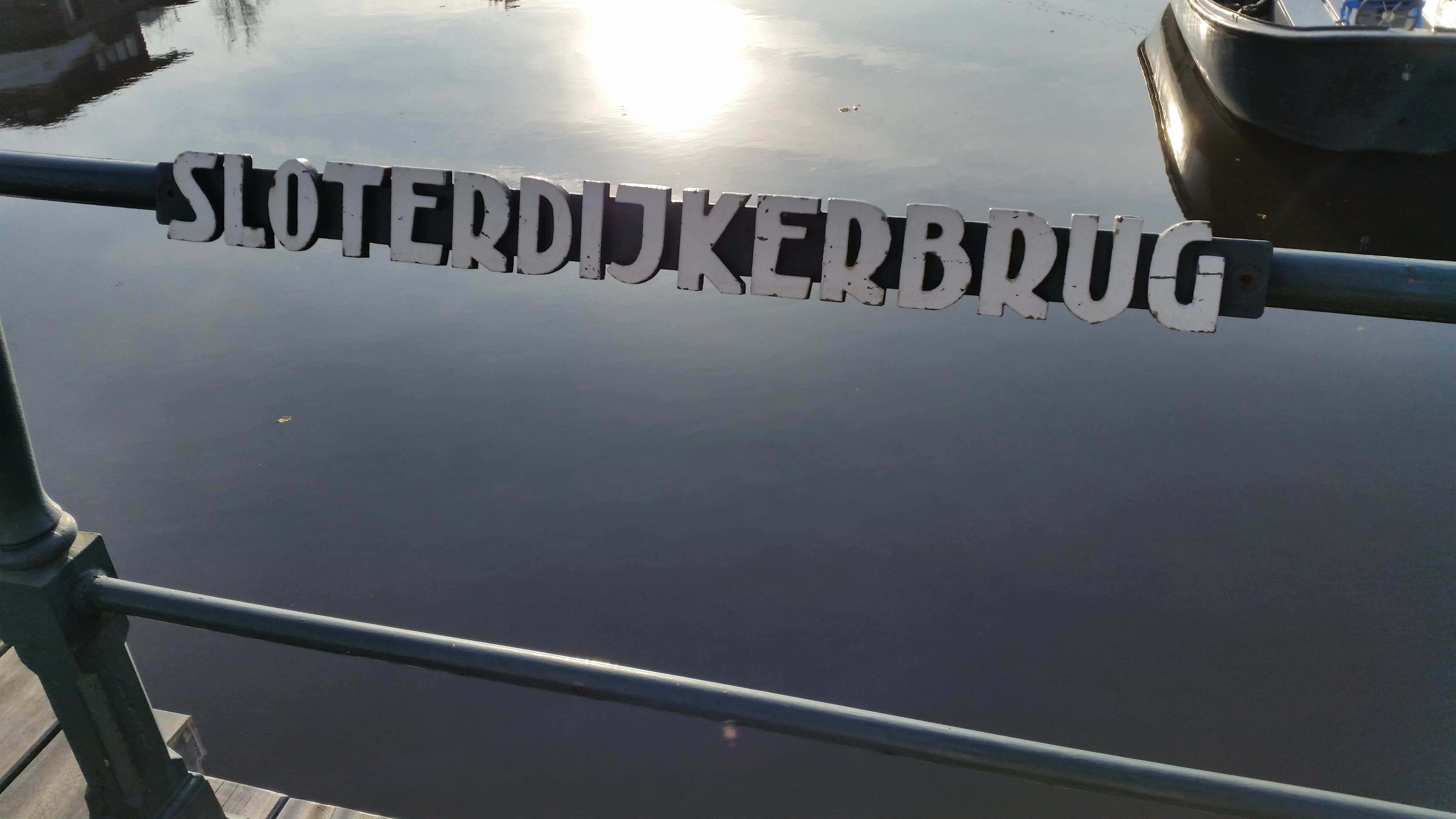 De Sloterdijkerbrug (brug 321) in Amsterdam-West in november 2019